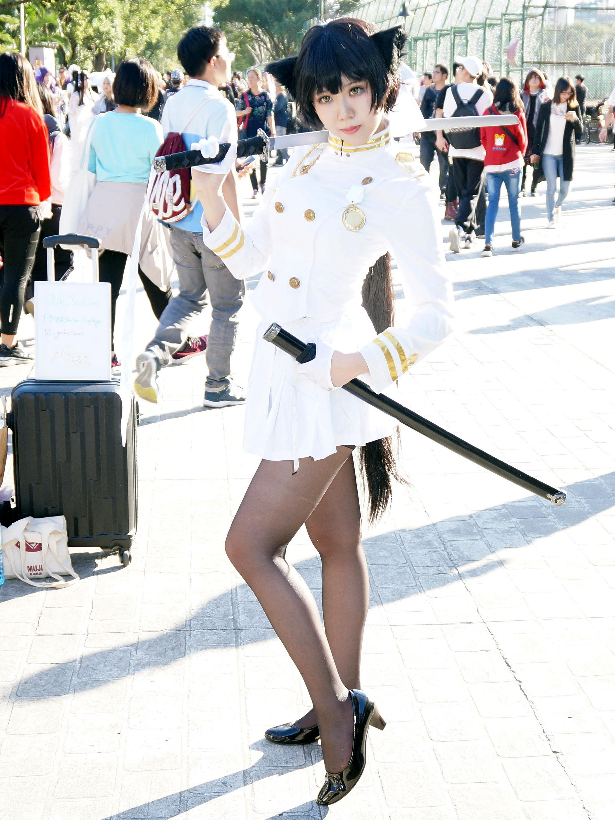 第53屆台灣同人誌販售會，語嵐cosplay《碧藍航線》高雄。